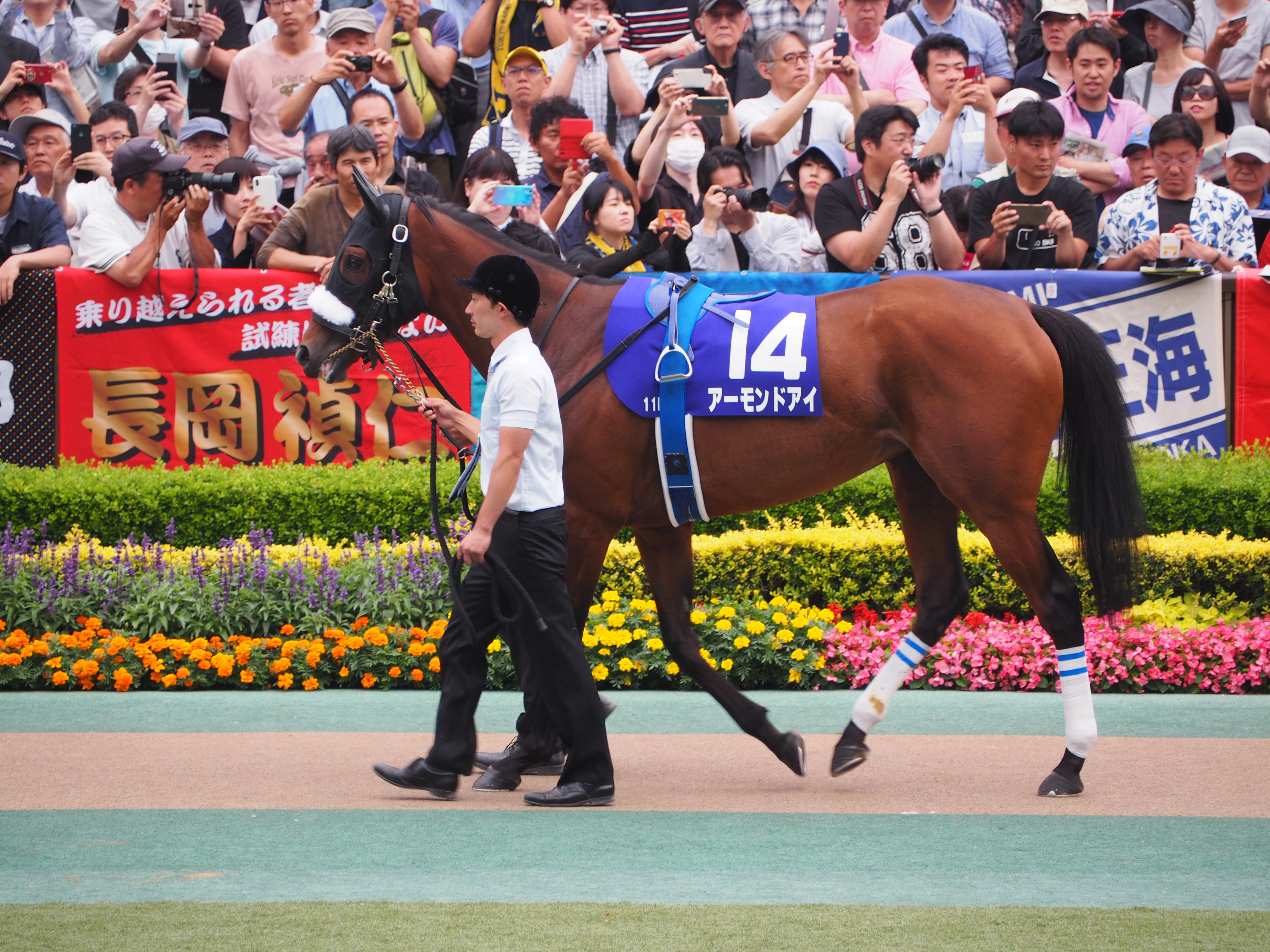 安田記念 パドック 2019